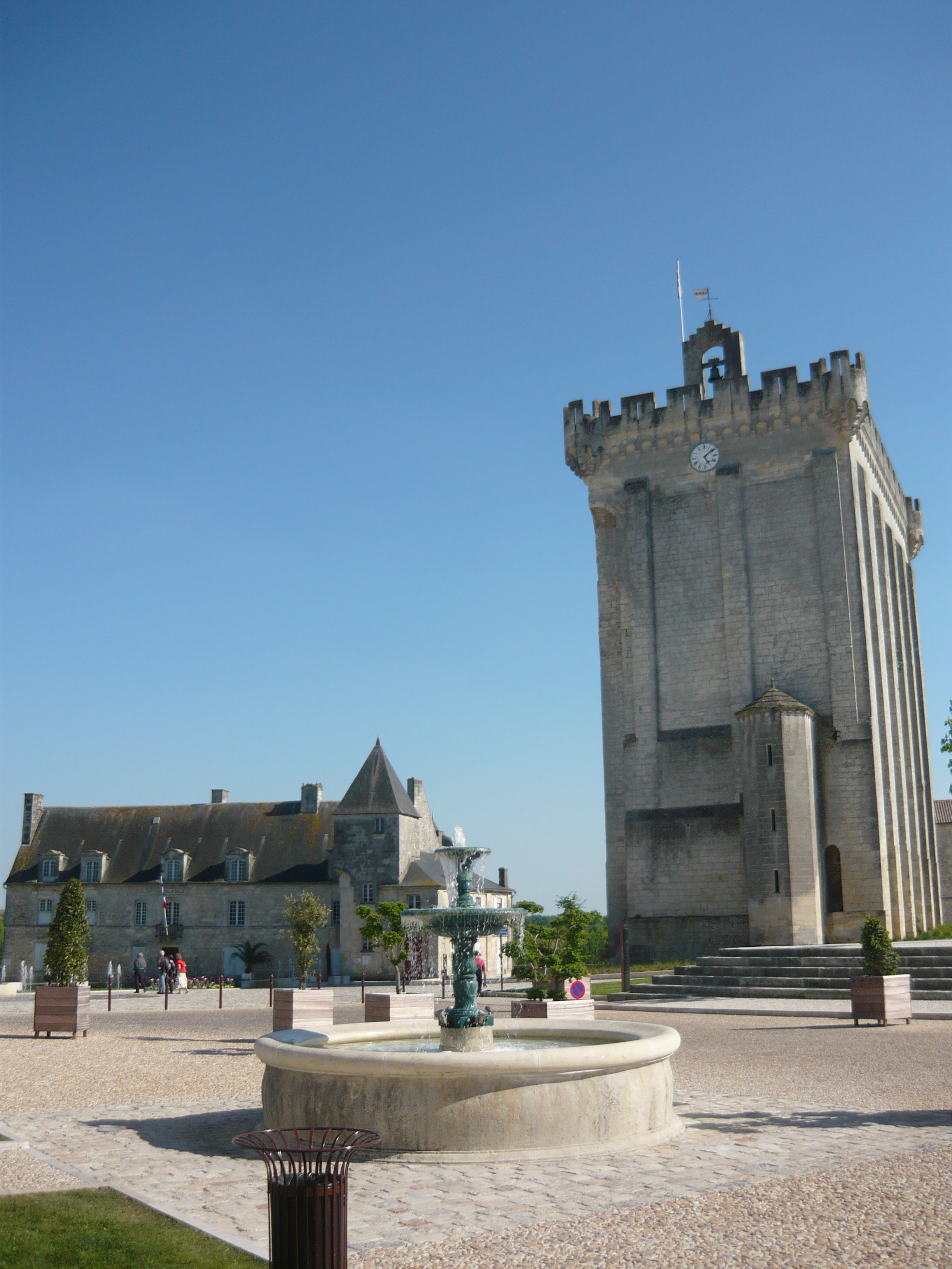 la fontaine, le donjon et la mairie de Pons (17)